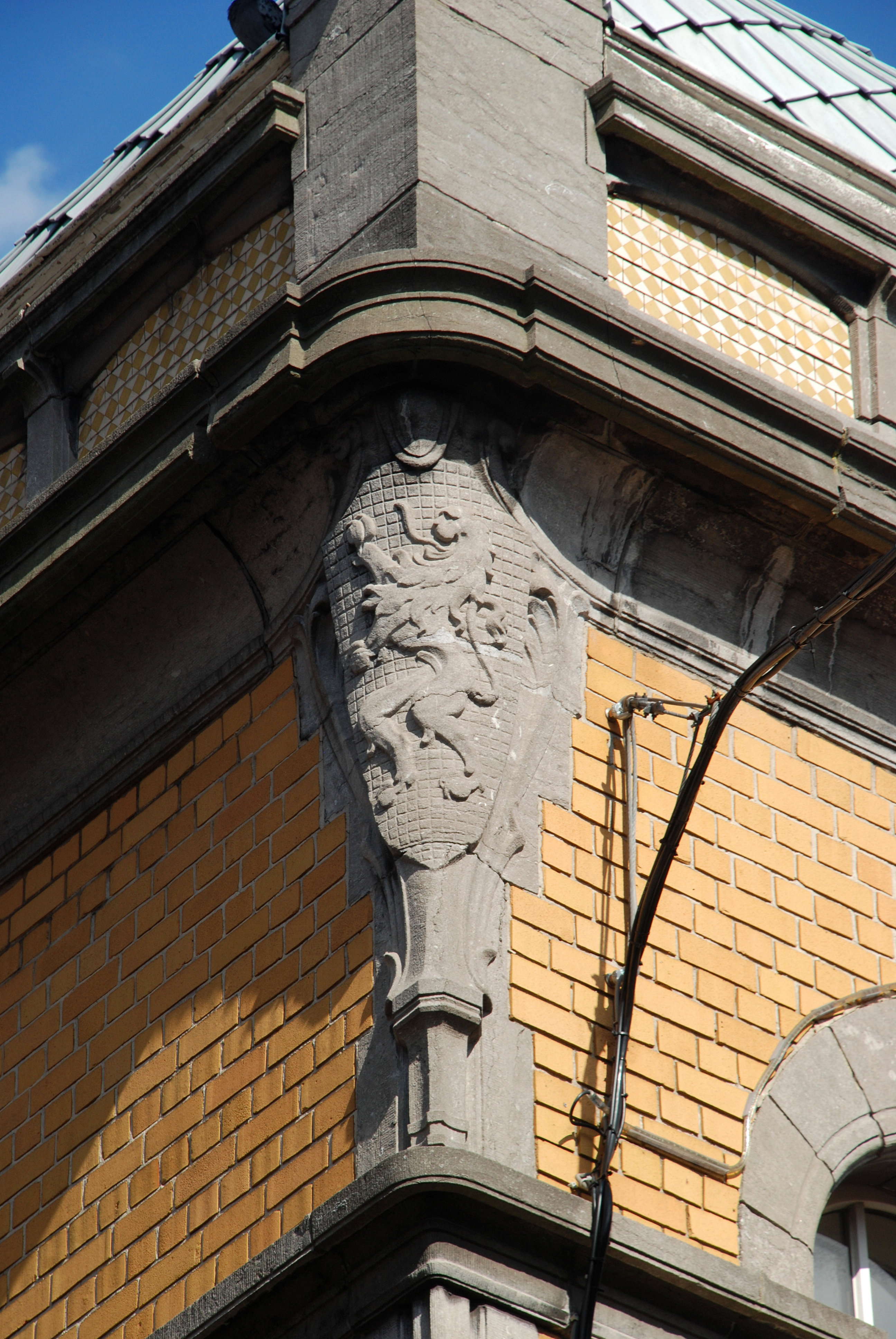 Belgique - Bruxelles - Ancienne école communale des filles de Koekelberg (Art nouveau - architecte Henri Jacobs)